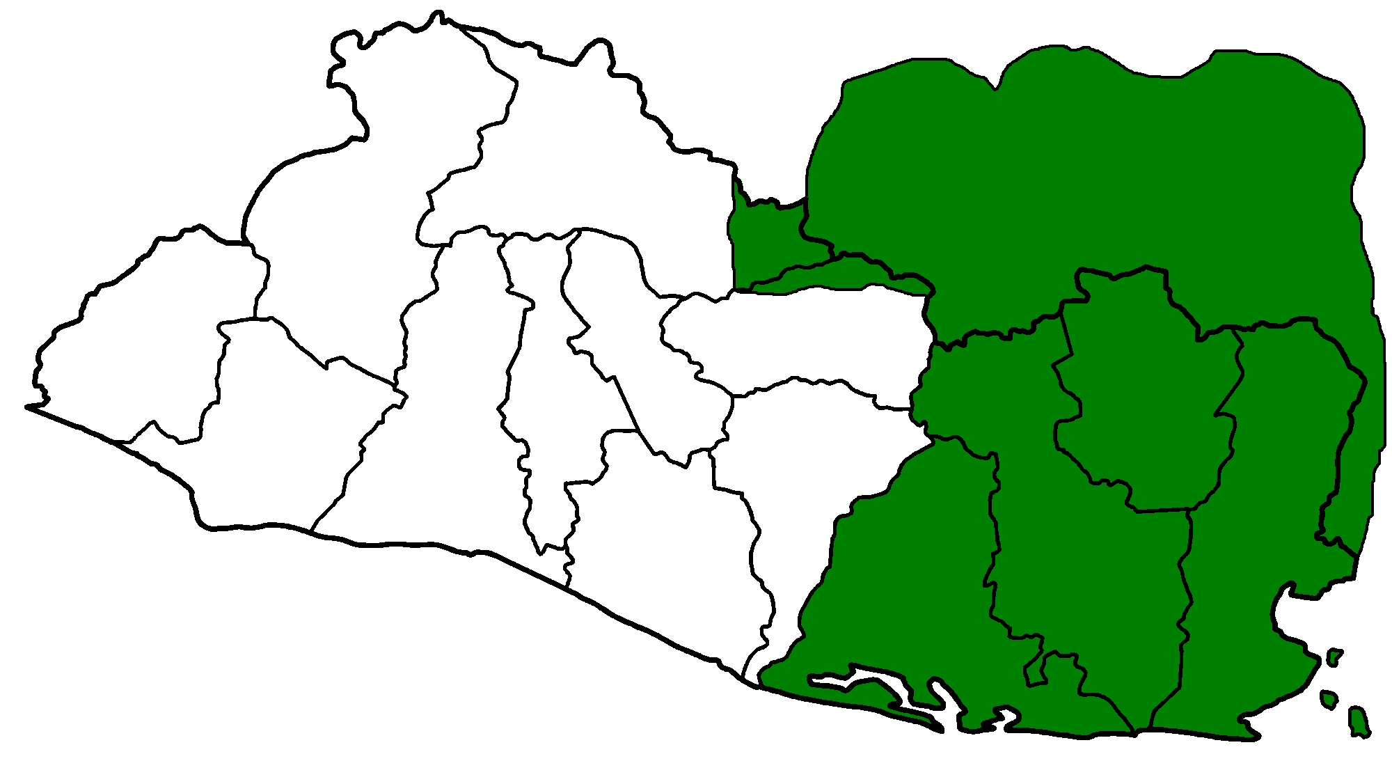 Este archivo fue creado copiando de wikicommons Image:El_Salvador_departments_blank.png y luego editado en el programa paint. fue hecho por y a la hora--Juan Miguel 17:06 16 jul 2006 (CEST)